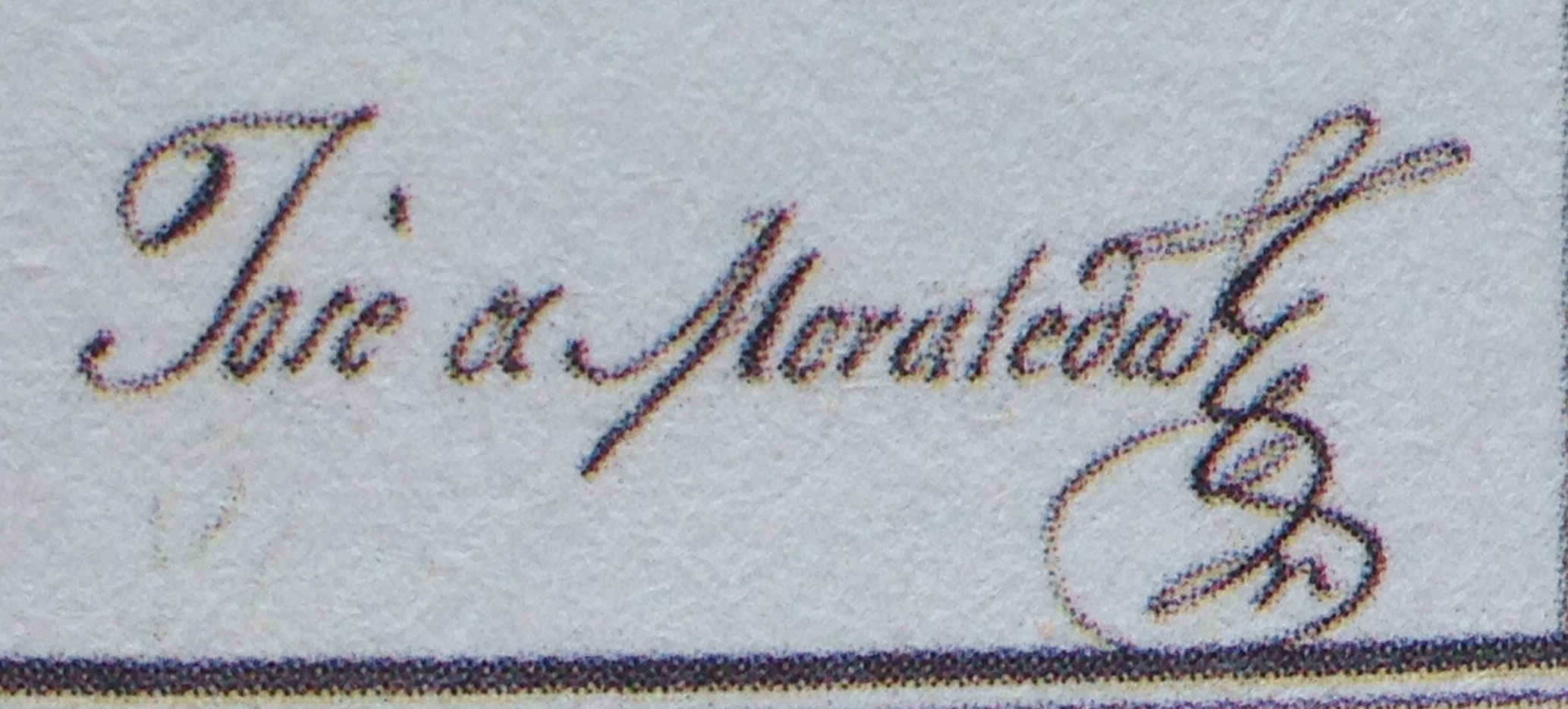 Firma de Jose de Moraleda